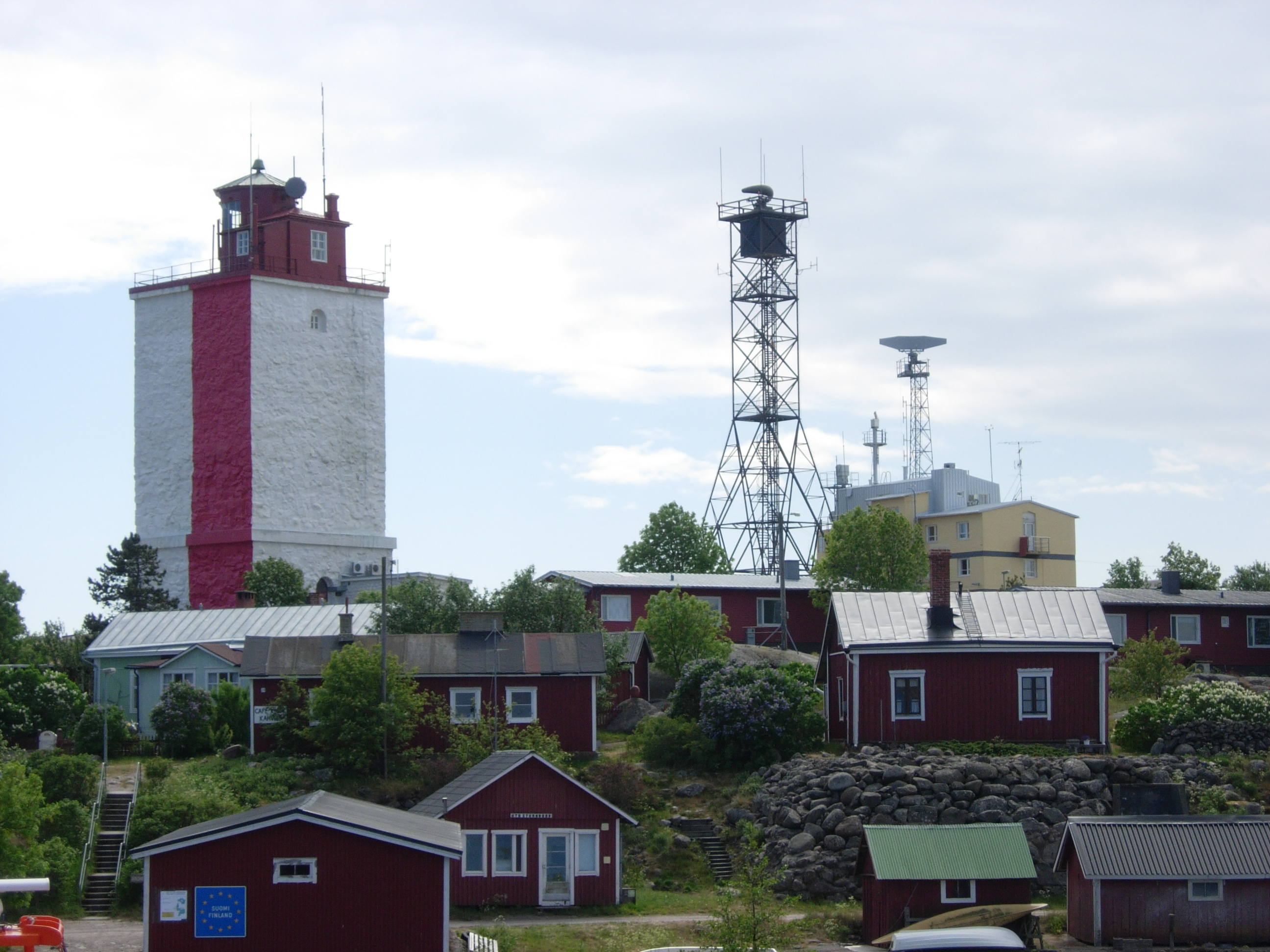 Utön majakka ja luotsiasema koillisesta